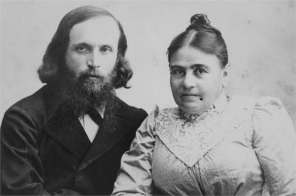 יהושוע ואולגה חנקין